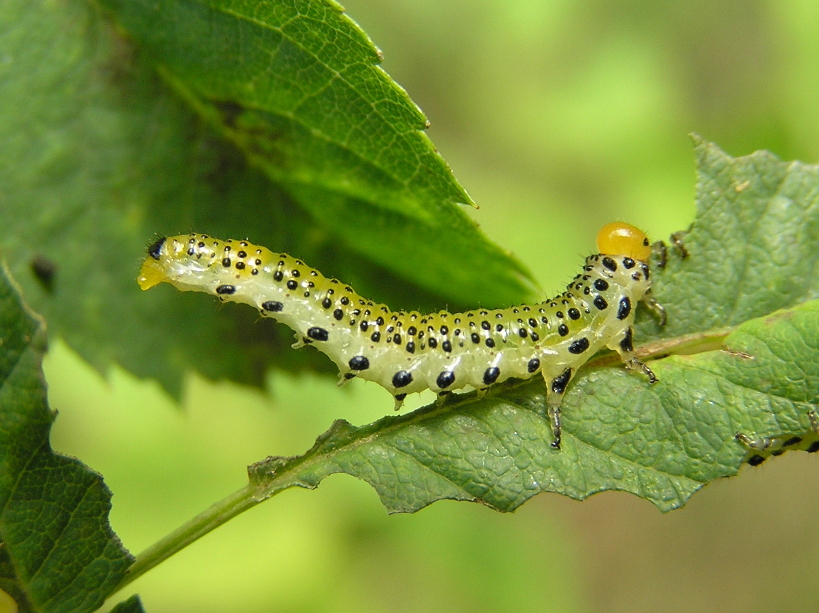 Arge pagana, Brok, Polska